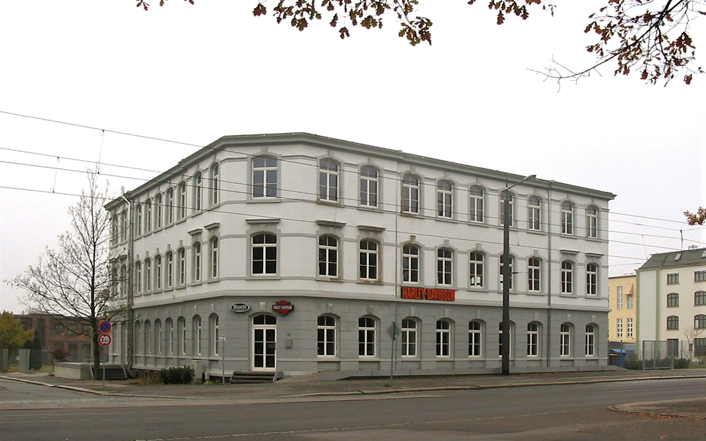 Radebeul, Chemische Fabrik v. Heyden, Meißner Straße 31